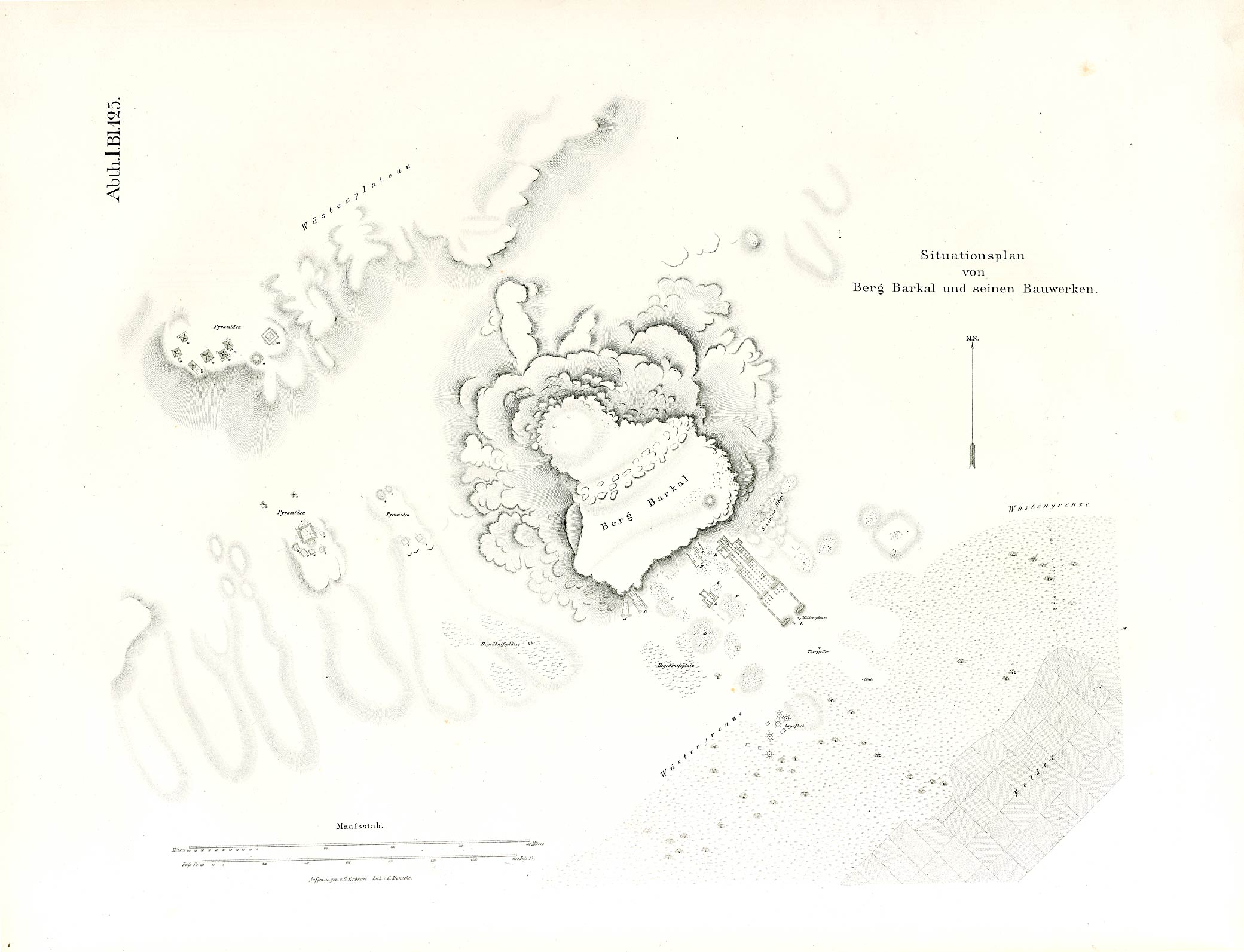 Denkmaeler aus Aegypten und Aethiopien nach den Zeichnungen der von Seiner Majestät dem Koenige von Preussen, Friedrich Wilhelm IV., nach diesen Ländern gesendeten, und in den Jahren 1842–1845 ausgeführten wissenschaftlichen Expedition auf Befehl Seiner Majestät